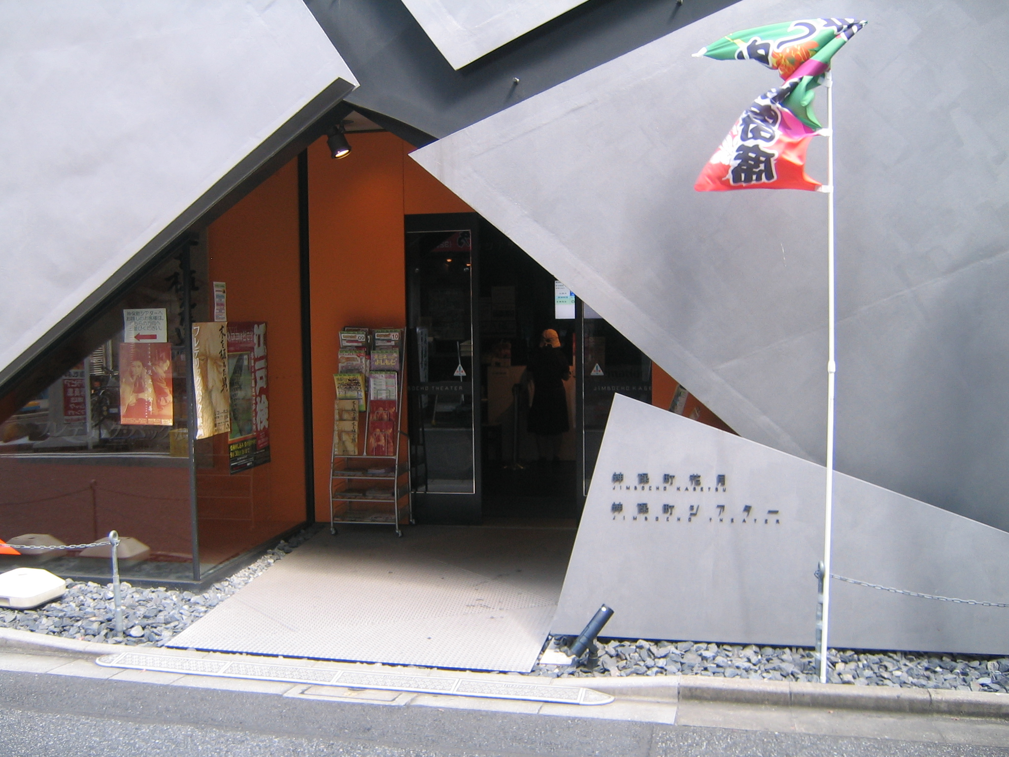 神保町シアタービル。2階に神保町花月がある。東京都千代田区神田神保町1-23